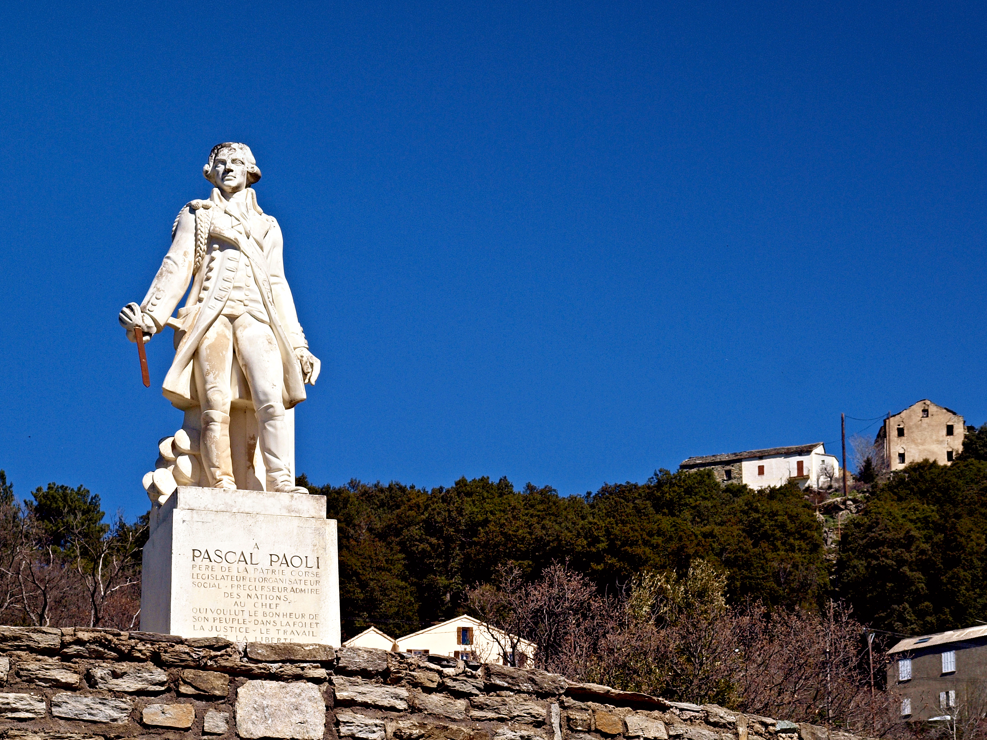 Morosaglia (Corsica) - Pascal Paoli